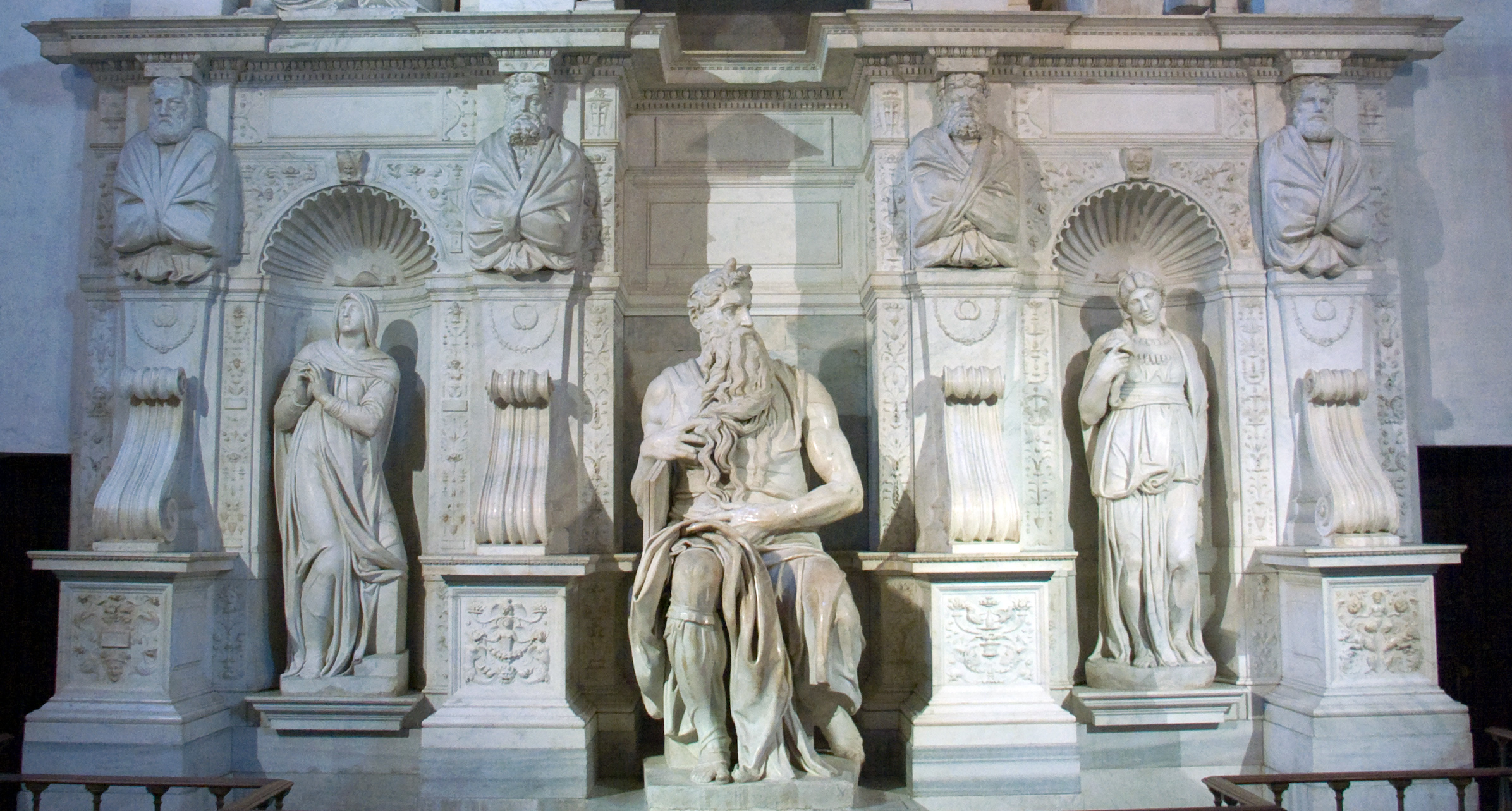 Rome, Basilique San Pietro in Vincoli, Moïse de Michel Ange